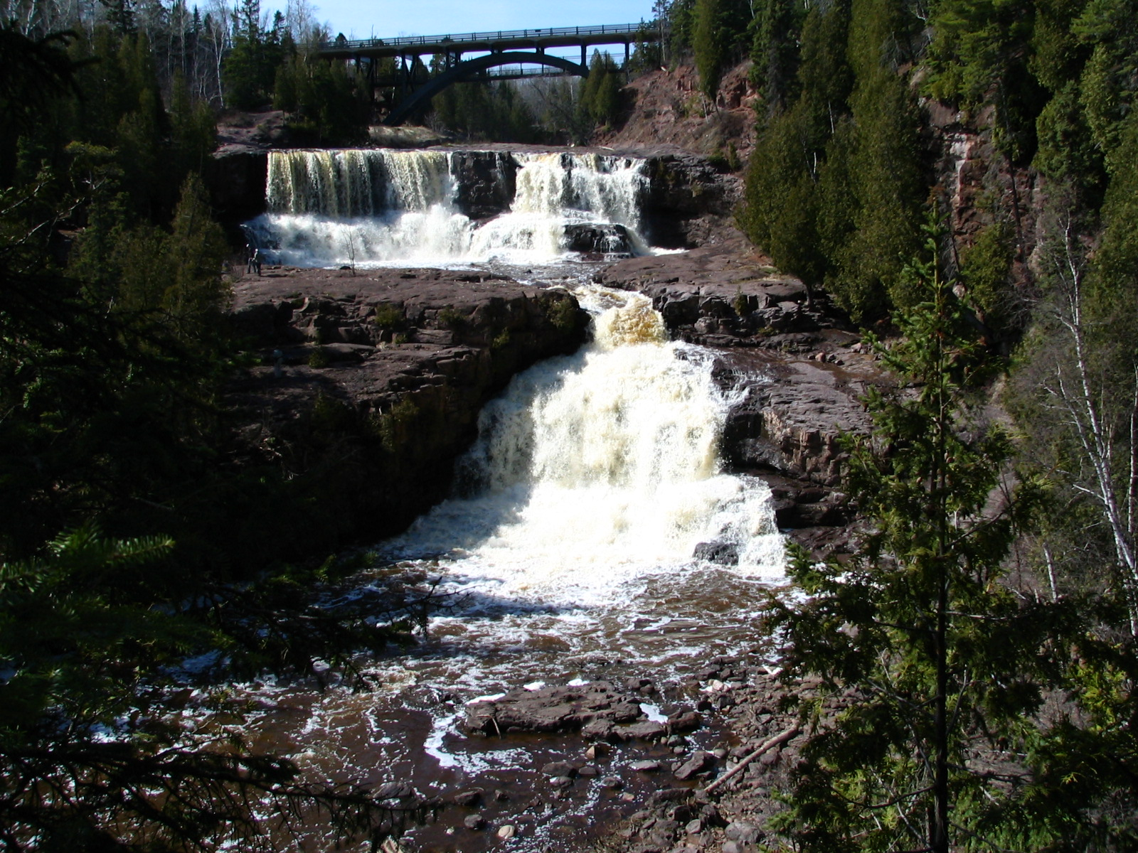 Falls